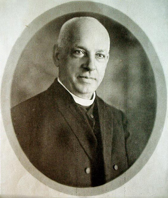 Portret pr. dr. Vasile Lucaciu (1852-1922)